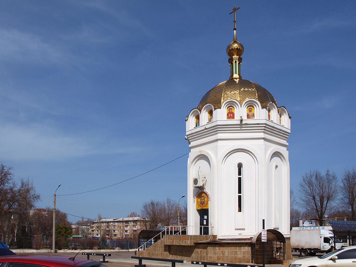 Каплиця у кв. Комарова (Луганськ)